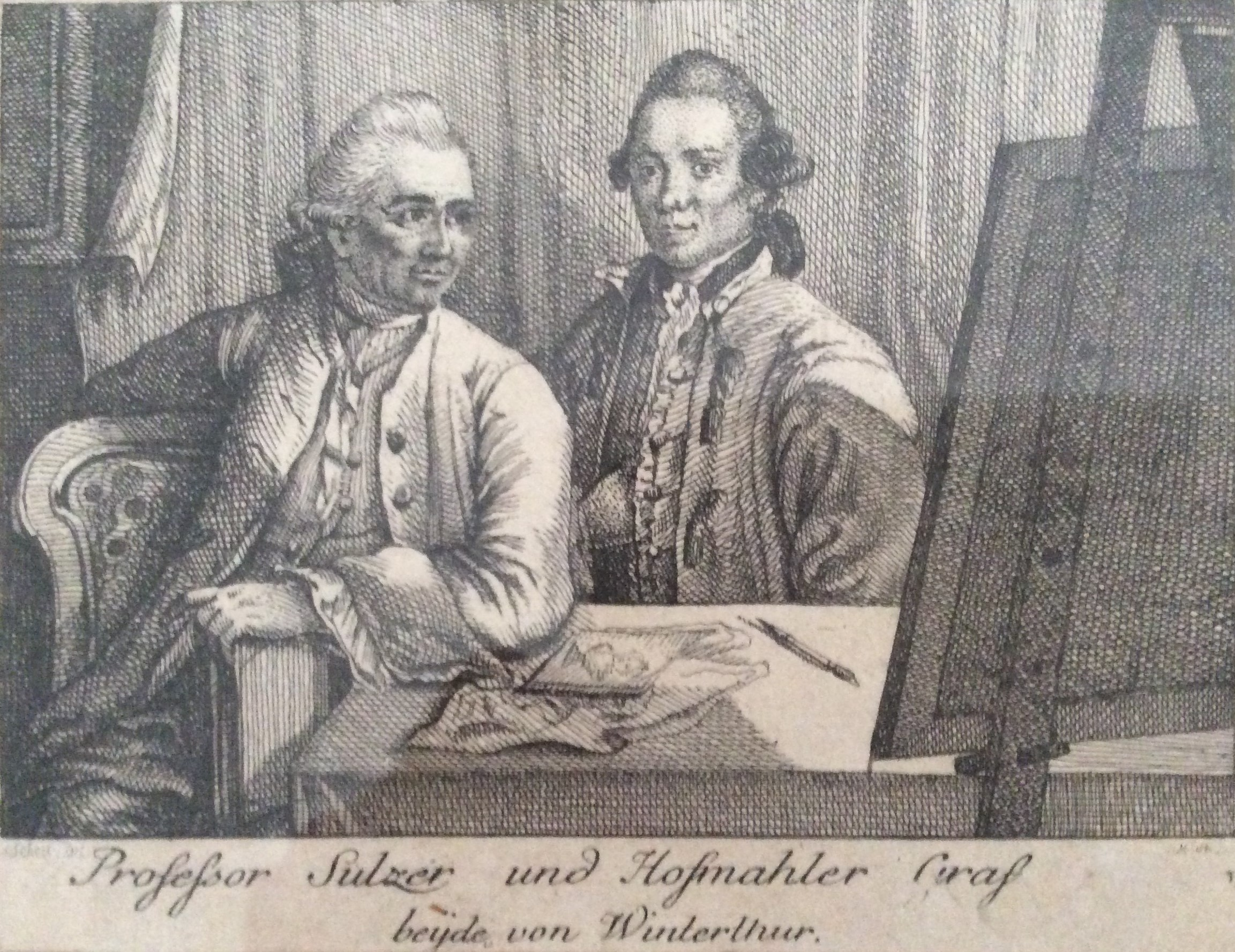 Johann Georg Sulzer und Schwiegersohn Anton Graff um 1780. Kupferstich von Matthias Stumpf (Signatur M. St.) nach einer Zeichnung von Schellenberg (Schell. del.).